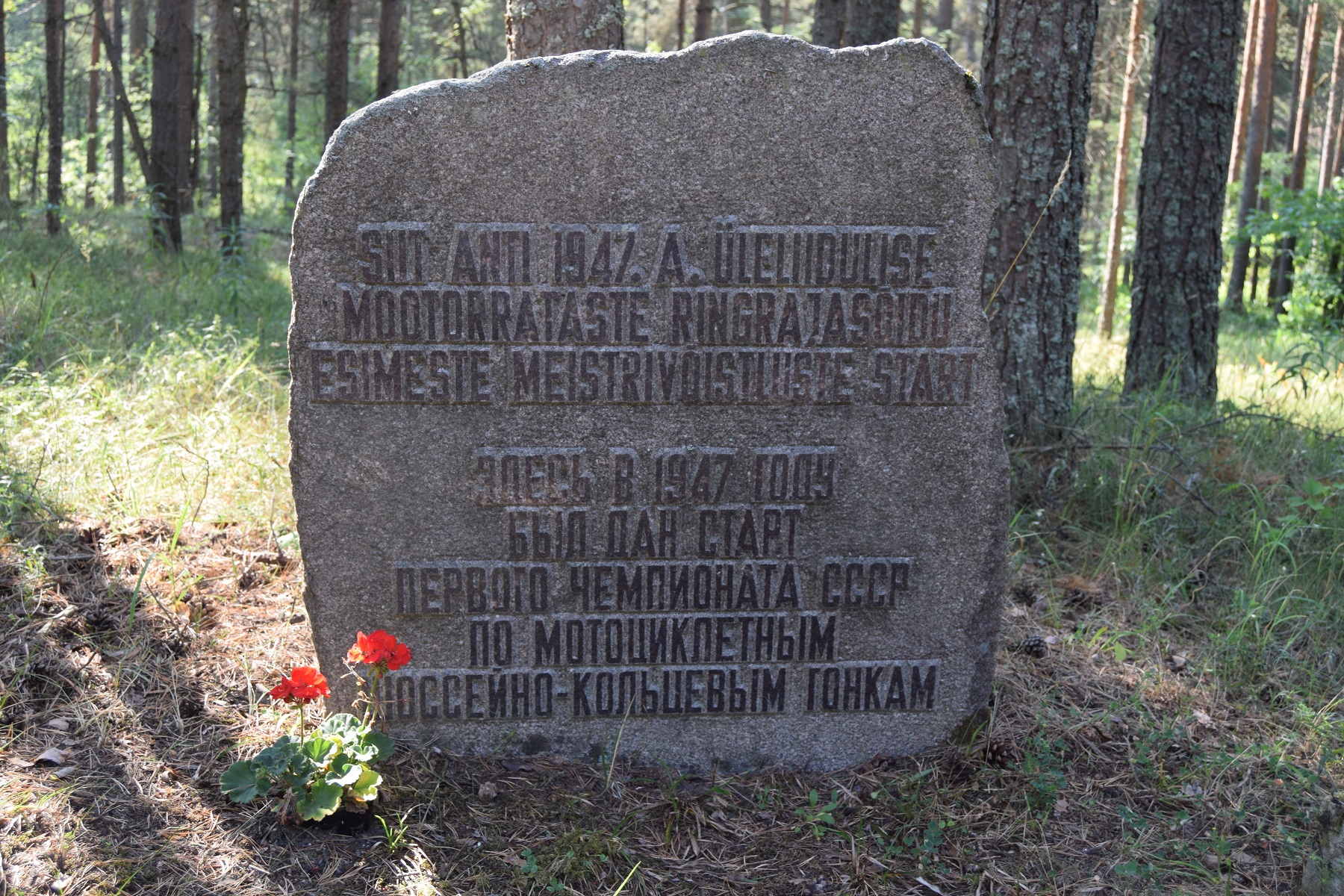 Mälestuskivi Pirita-Kose-Kloostrimetsa ääres 1947.a. üleliidulise motovõistluse stardipaigas